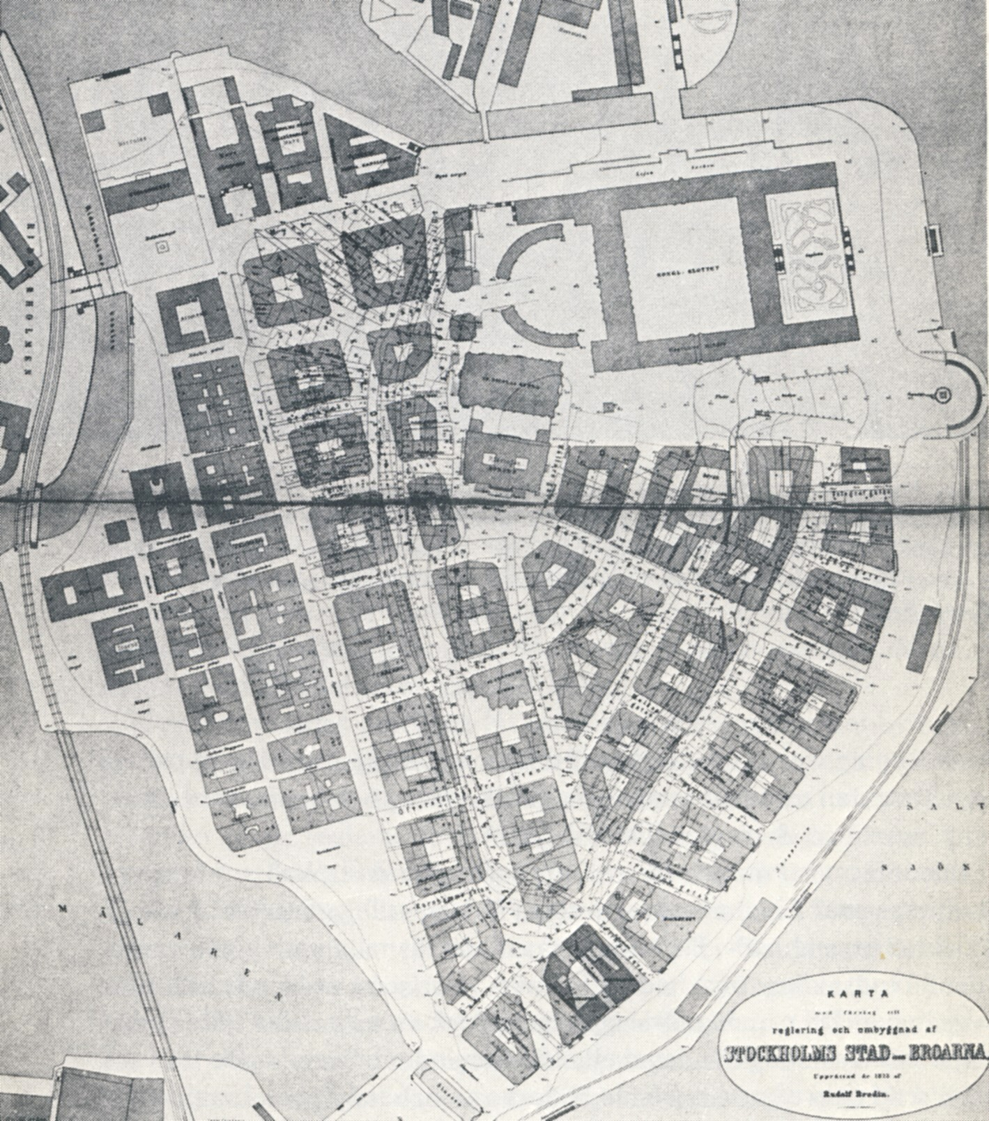 Förslag till reglering av Gamla stan, Stockholm